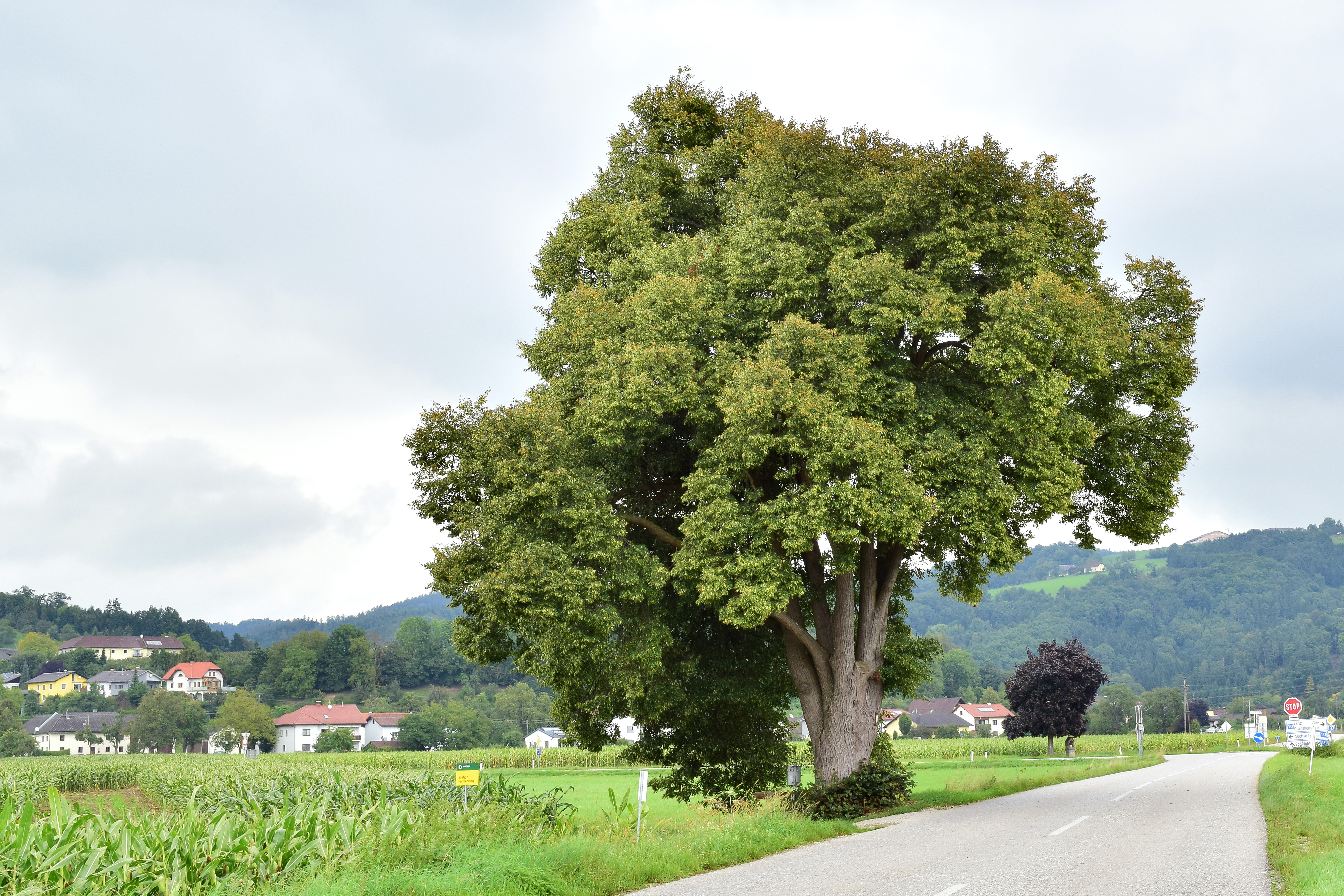 Linde in Feldkirchen This media shows the natural monument in Upper Austria with the ID nd325.